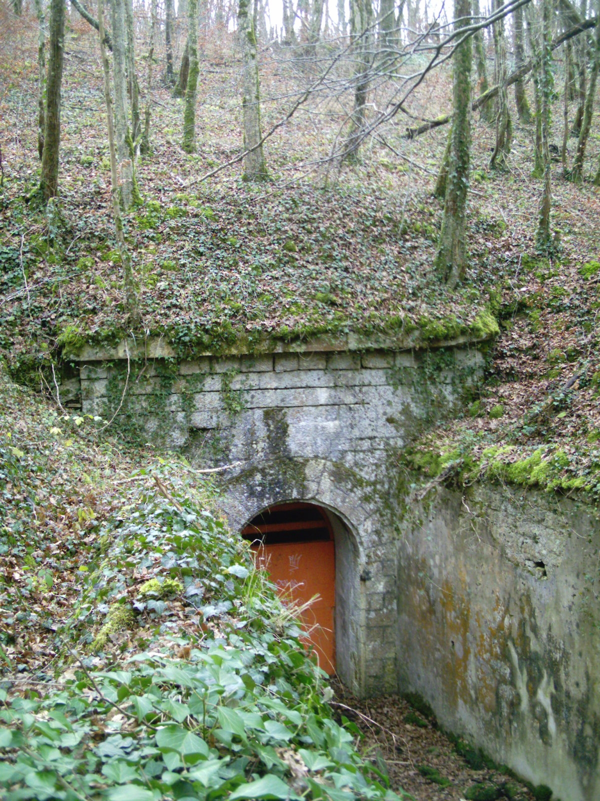 Accès souterrain de la poudrière de Bois sous Roche